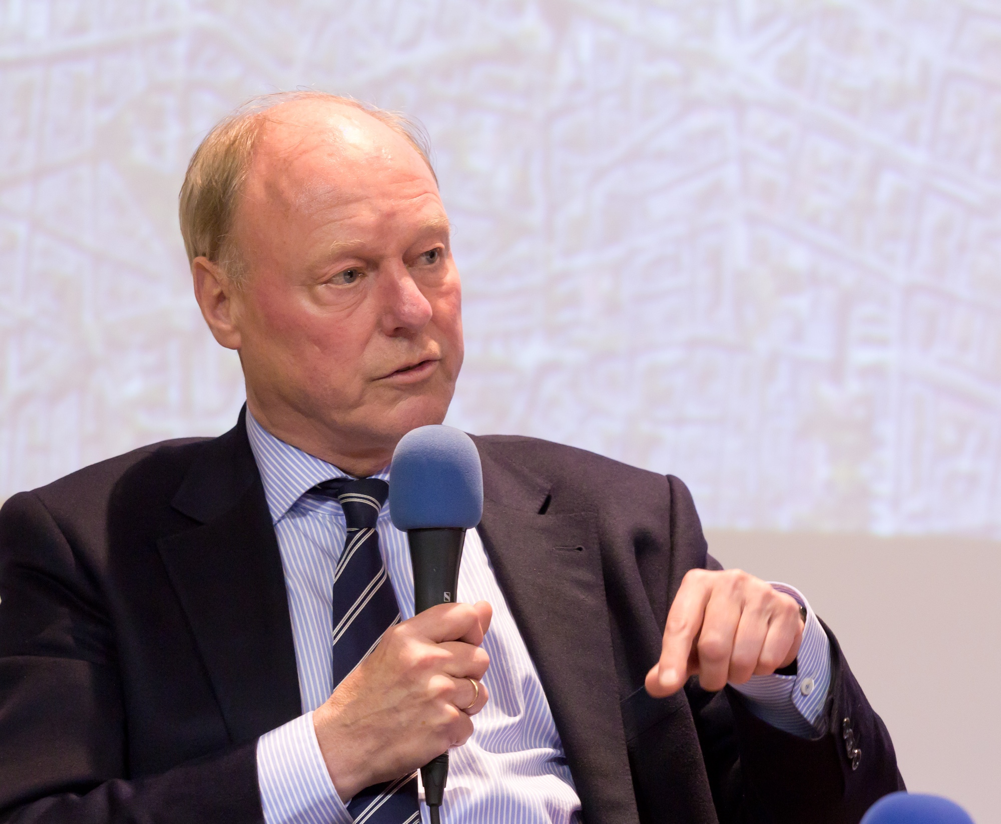 Kaspar Kraemer, deutscher Architekt, 2001 – 2007 Präsident des Bund Deutscher Architekten BDA, bei einem Vortrag mit Diskussionsrunde beim Architekturforum Rheinland; Domforum, Köln